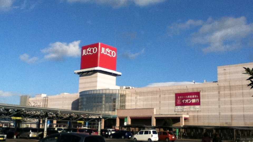 イオン四日市北ショッピングセンターの2011/3までの様子です。